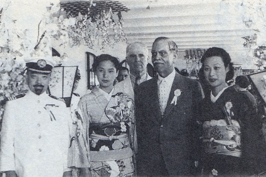 竜田丸船内の水の江瀧子（左より2番目）